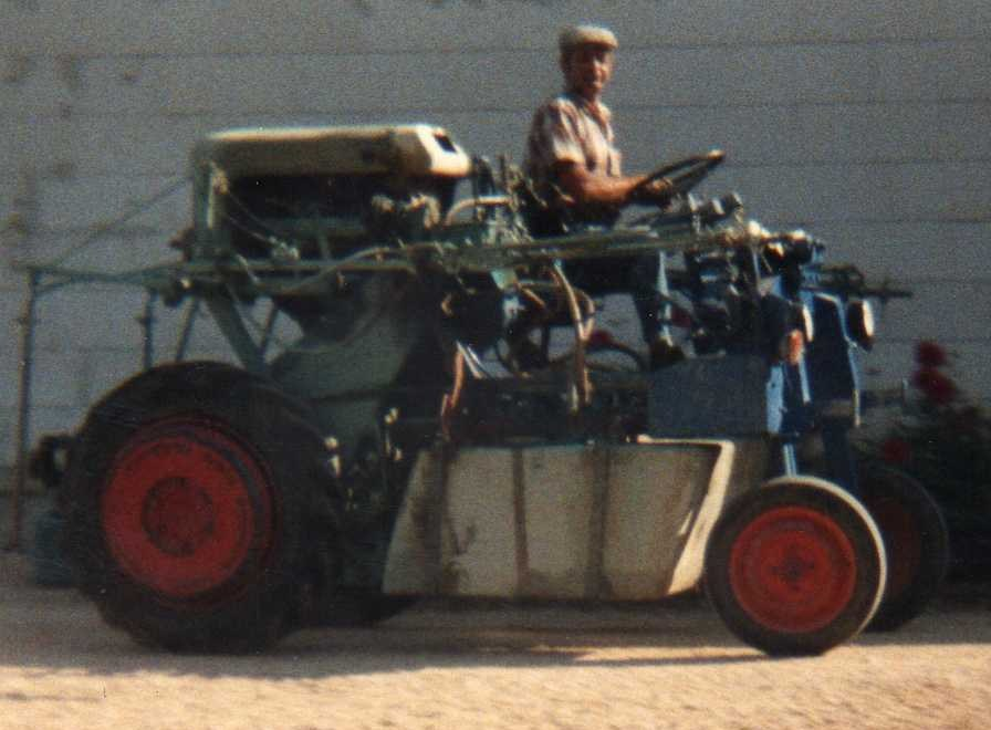 Enjambeur